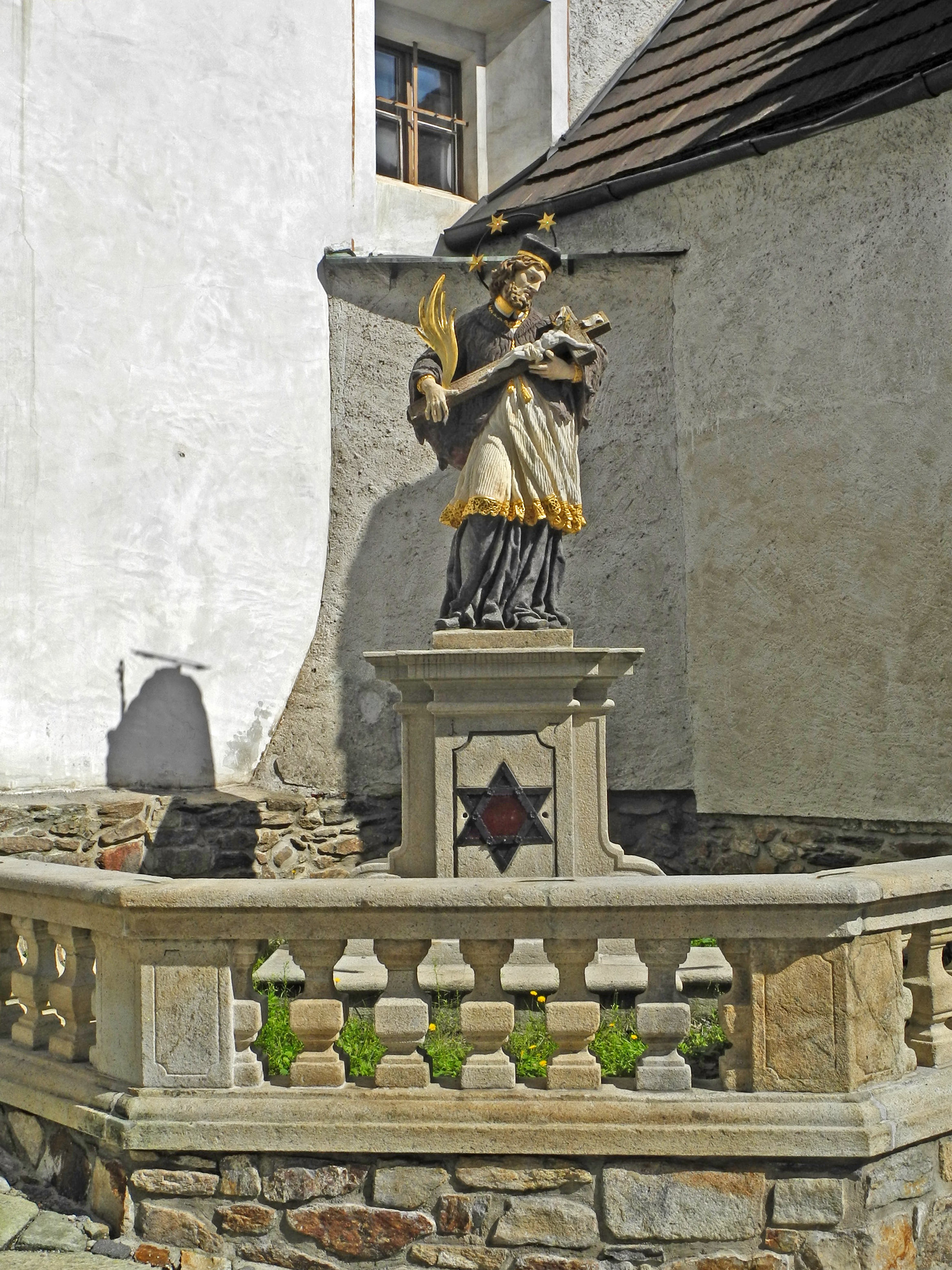 Nepomukdenkmal an der Pfarrkirche Mariä Heimsuchung in Winterberg (Vimperk) im Böhmerwald